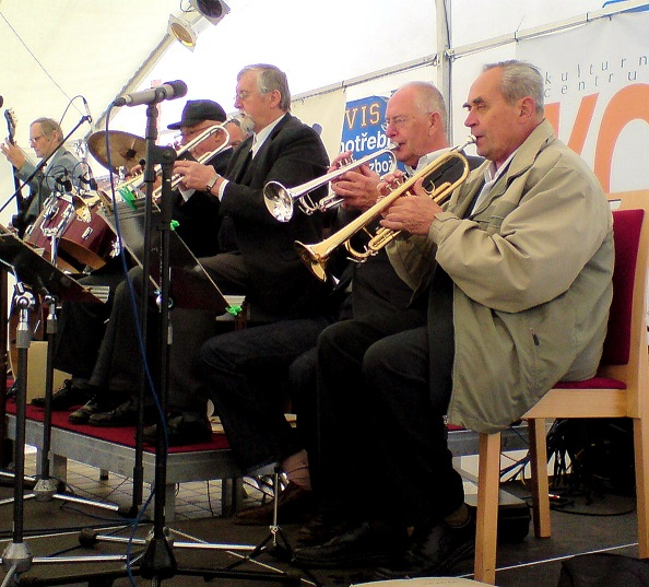 Dechová sekce tanečního orchestru Merkur (foto Jiří Pokorný 2009)